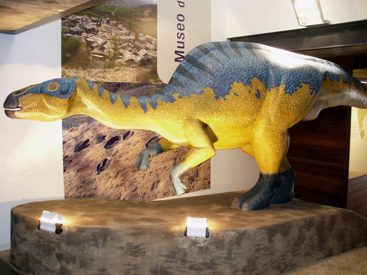 Reconstrucción de Arenysaurus realizada en 2007 para el Centro de Interpretación de los Ultimos dinosaurios Europeos en Arén (Huesca).